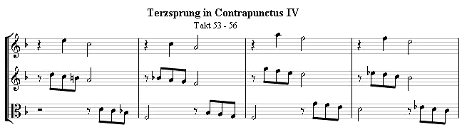 Terzsprung in Contrapunctus IV von J.S. Bachs Kunst der Fuge